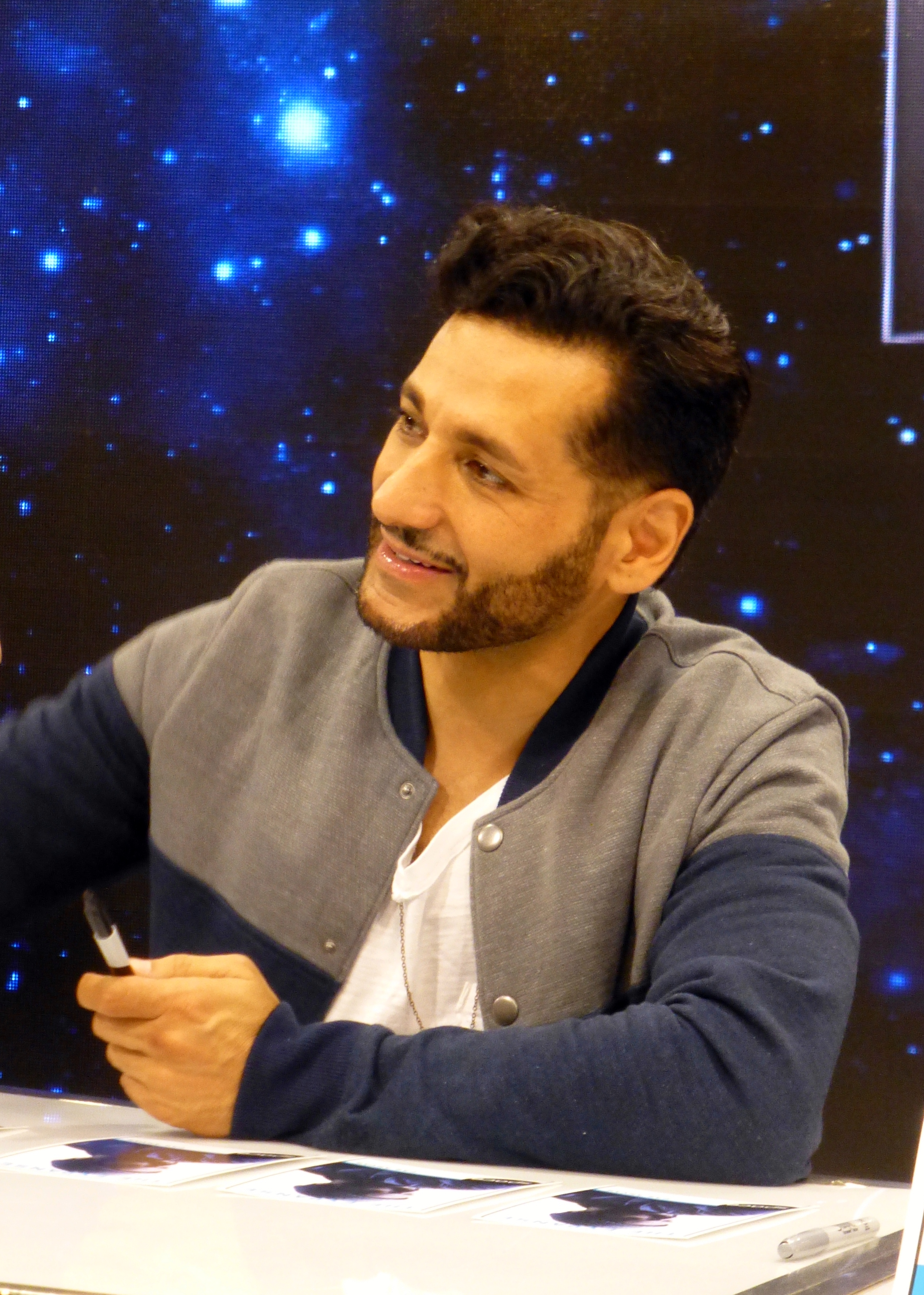 Expanse 08